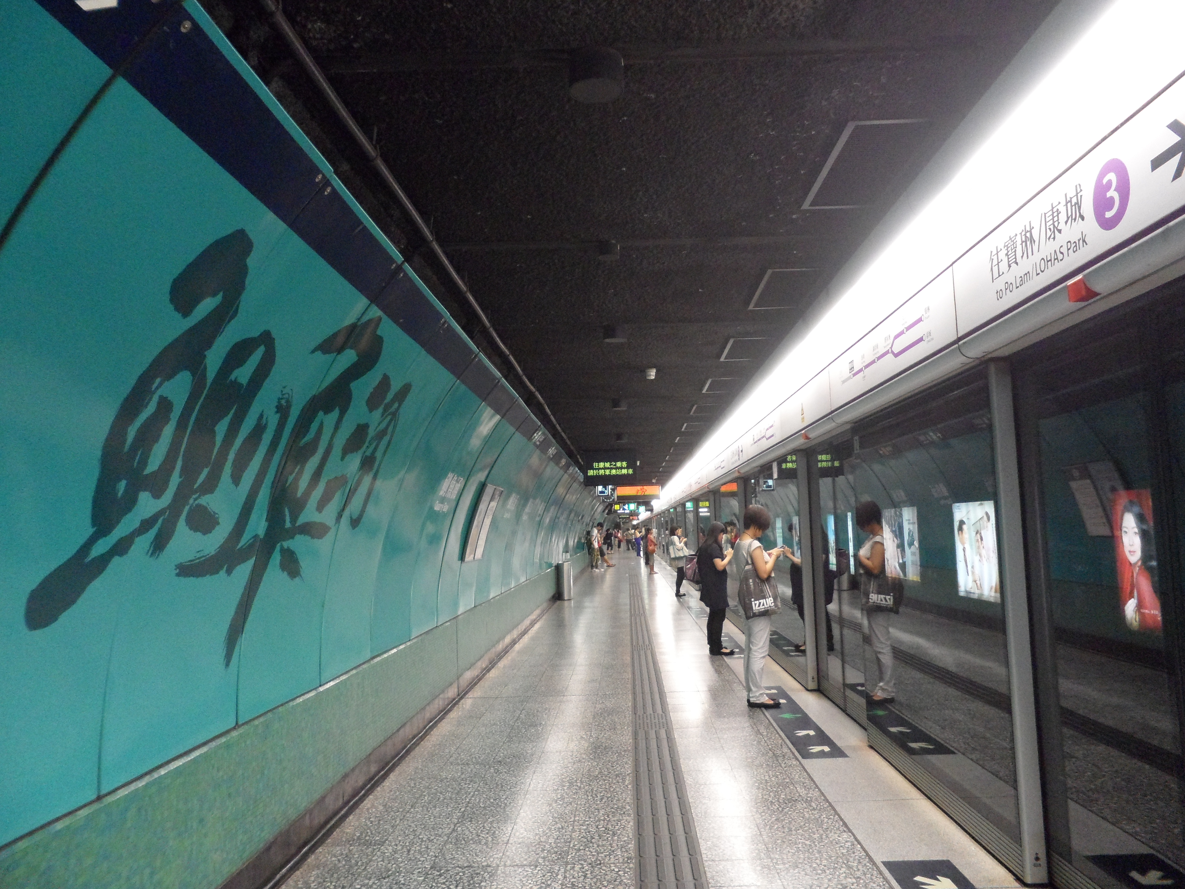 鰂魚涌站三號月台